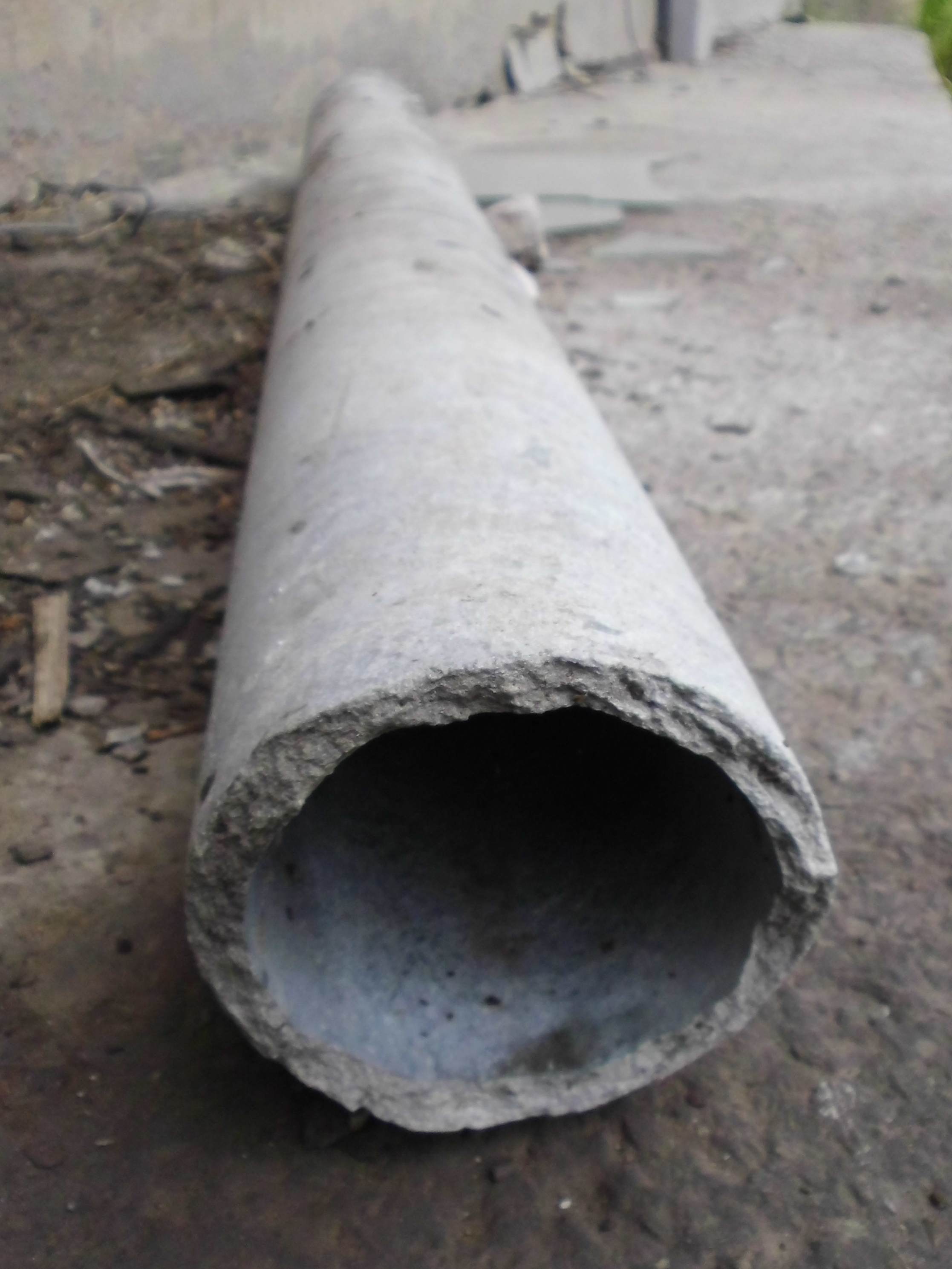 Кусок асбестоцементной трубы. Место излома, видны включения асбестовых волокон